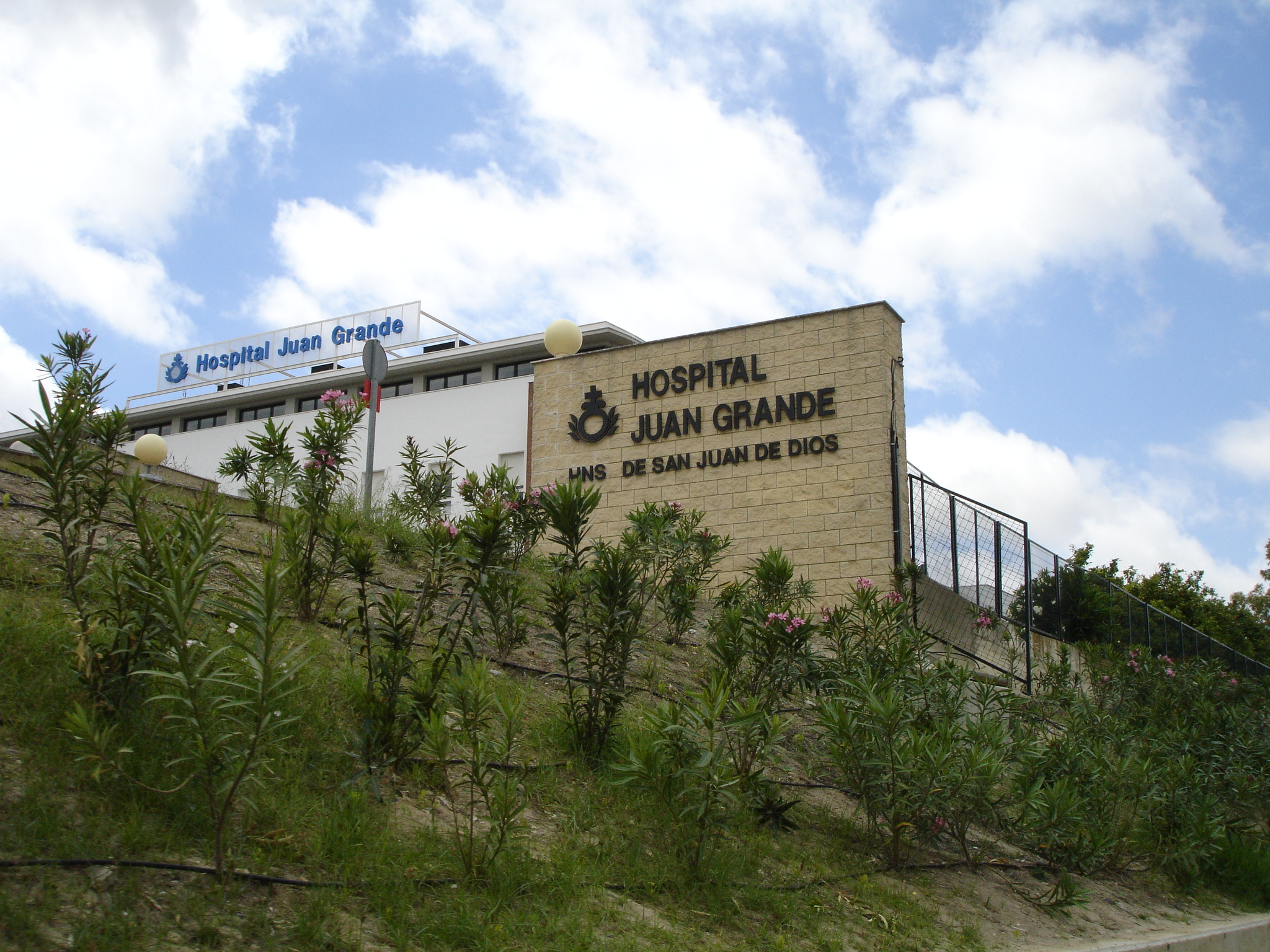 San Juan Grande hospital in Jerez de la Frontera. Andalusia, Spain